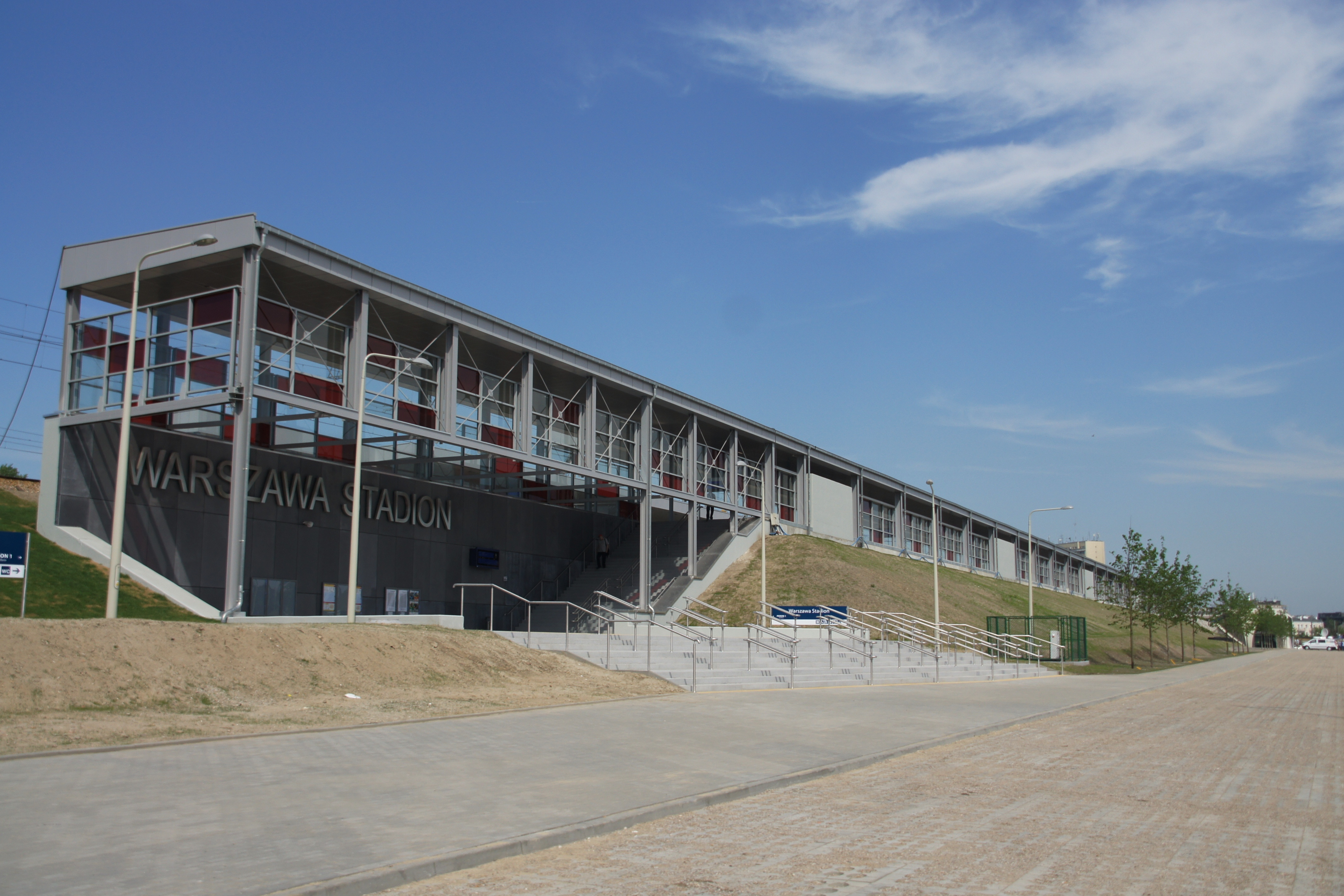 Stacja Warszawa Stadion - 05.05.2012 - dzień otwarcia po remoncie